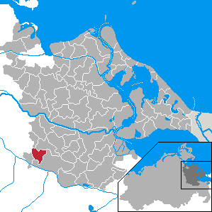 Iven, Landkreis Ostvorpommern, Mecklenburg-Vorpommern